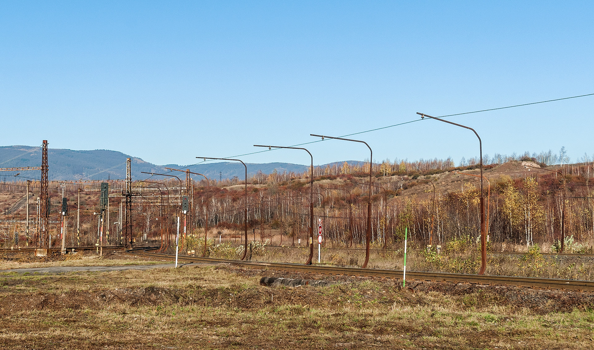 Jednoduché trakční vedení, používané na důlních tratích CCS v lomu Vršany na Mostecku.